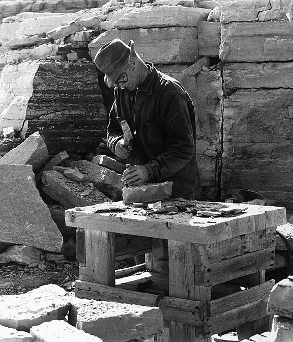 Stenhuggare. Bilden troligen från slutet av 1960-talet.